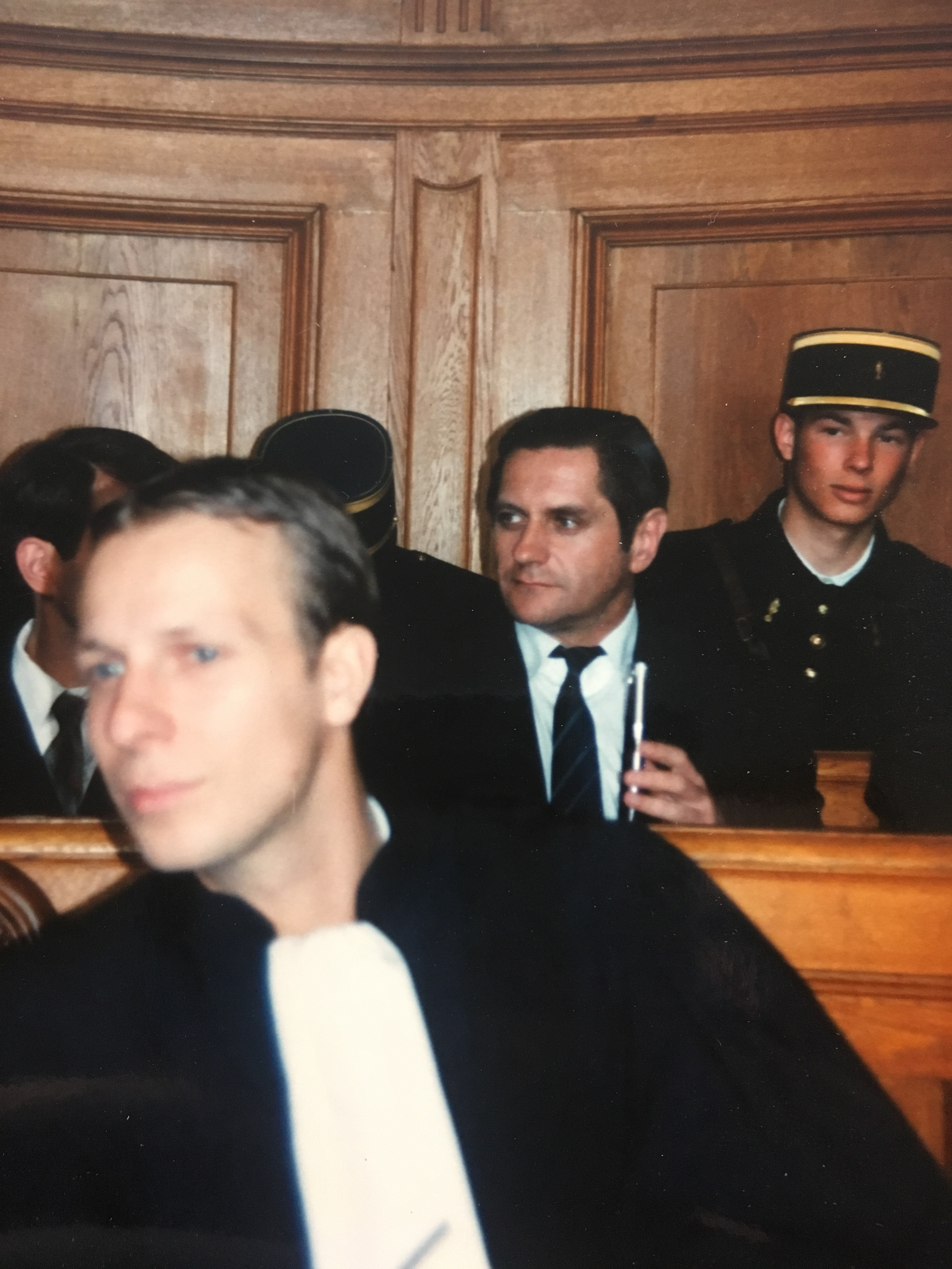 Maxime Leroux (au centre) sur le tournage du film "Les Alsaciens ou les Deux Mathilde" en 1995